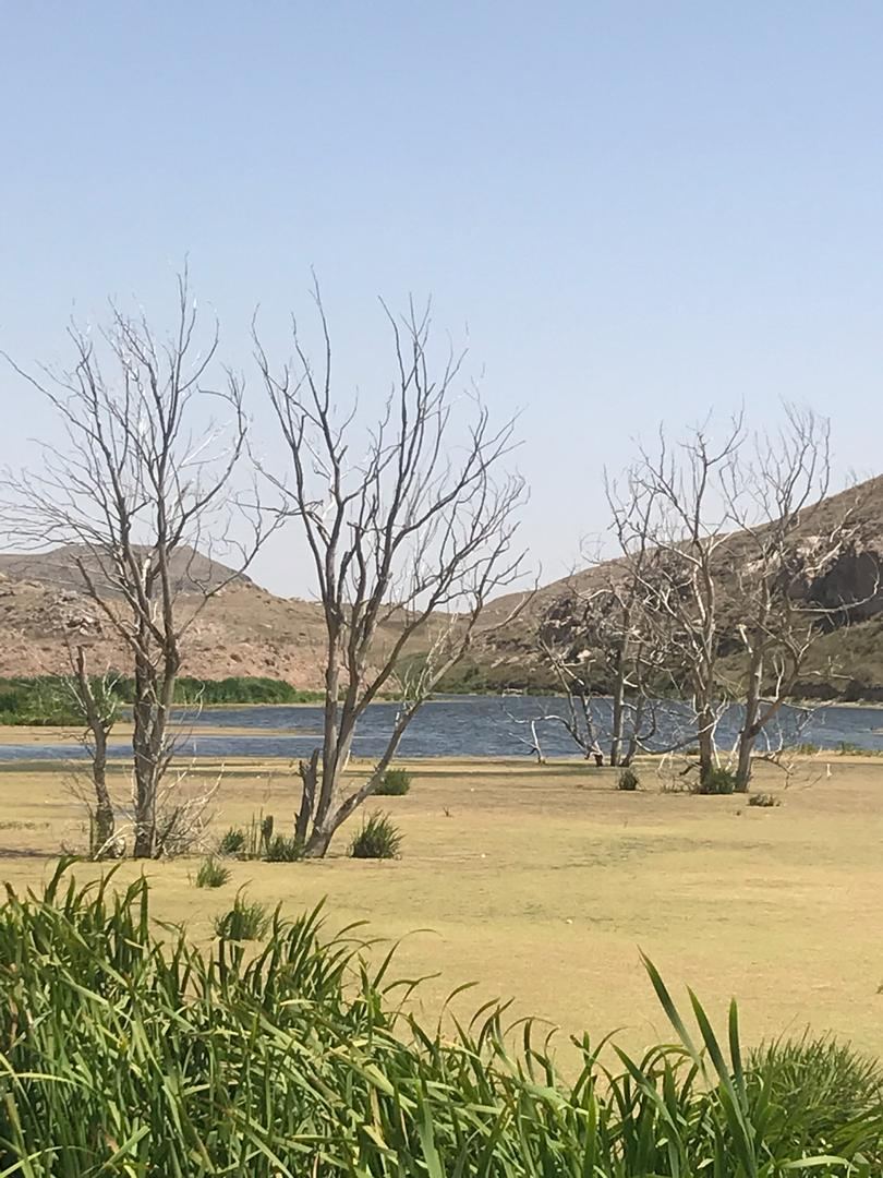 تپه پیرکریم